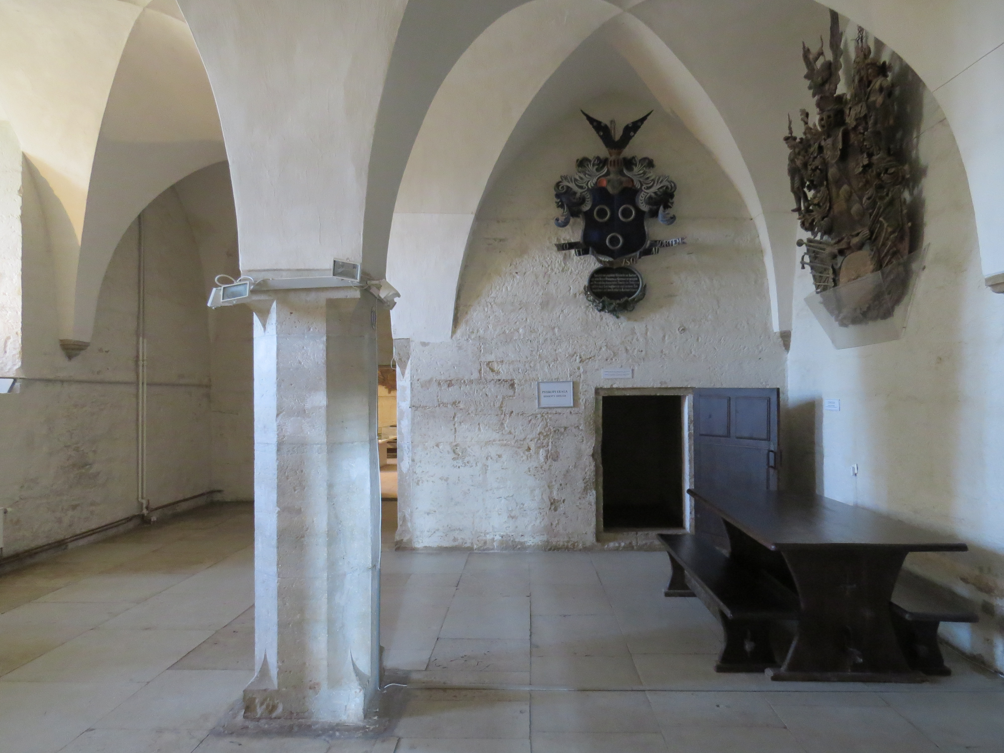 Biskopens stue på Kuressaare Slot (Ahrensborg), Saaremaa (Øsel), Estland